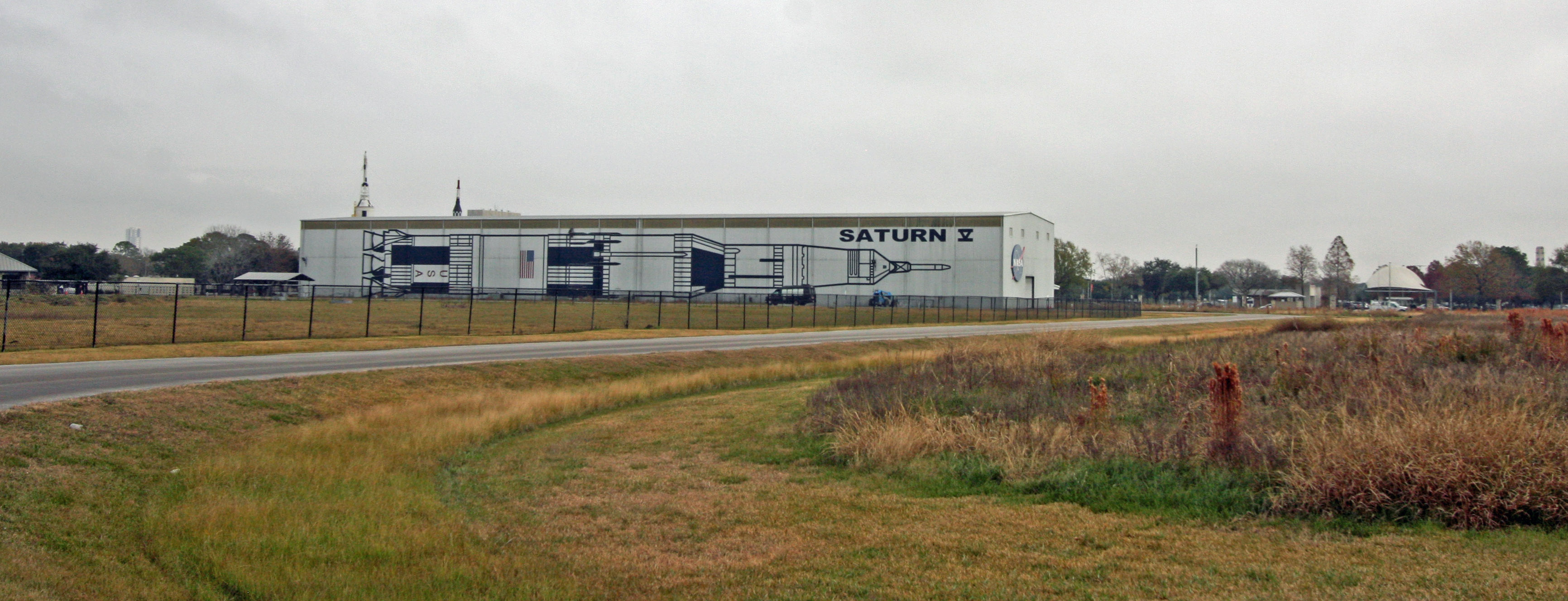 JSC Houston; December 18, 2018.